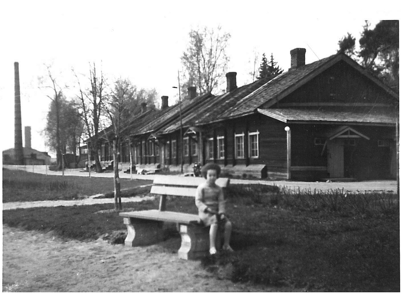 Pitkä pytinki -niminen rakennus Naissaaressa 1950-luvulla